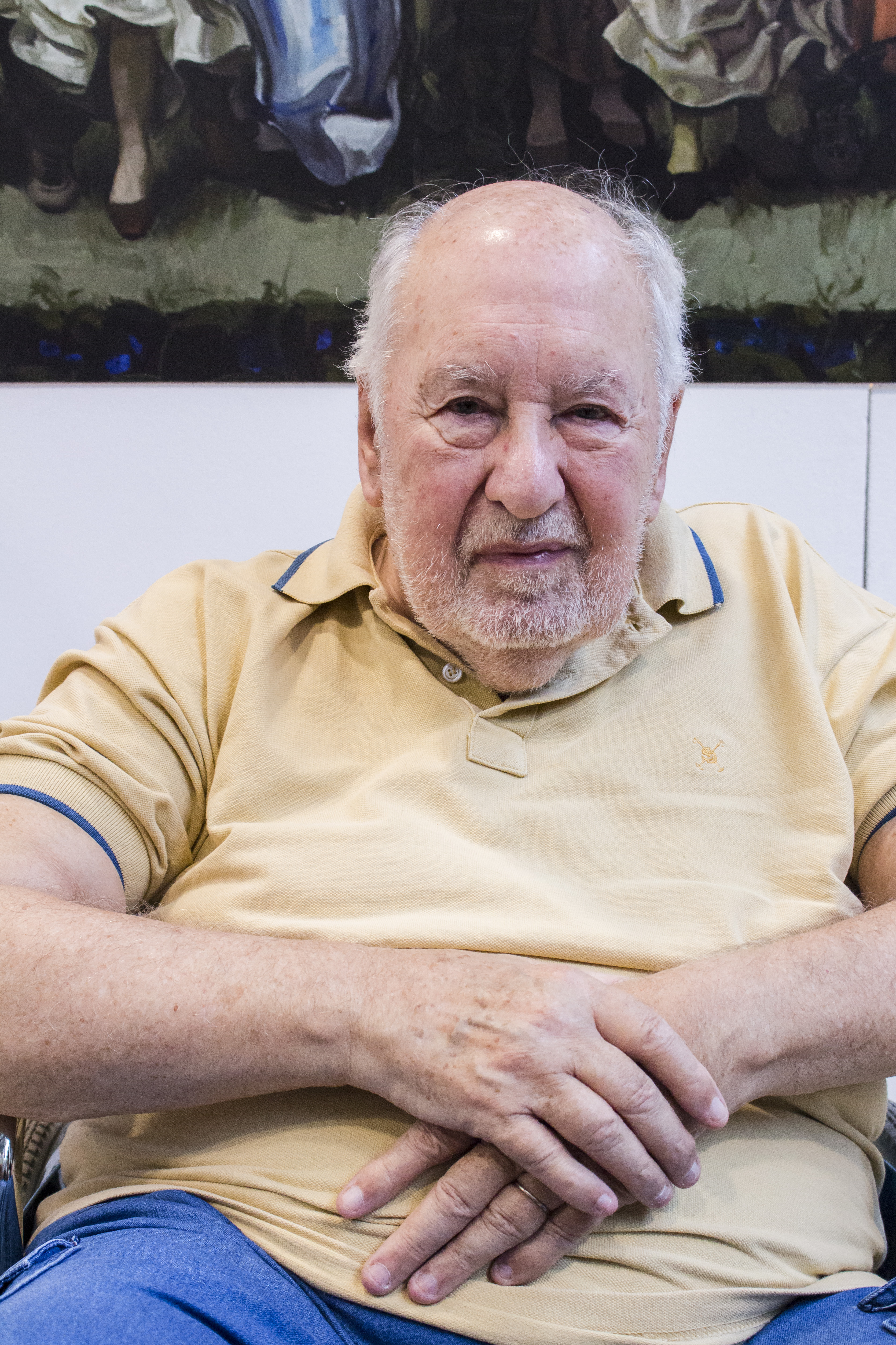 Inauguración de la muestra de Guillermo Roux en la Casa de la Cultura (21-24_33). Buenos Aires, 19 de abril de 2018 - En la Casa Central de la Cultura Popular se realizó la inauguración de la muestra del artista Guillermo Roux. Fotos: Mauro Rico / Ministerio de Cultura de la Nación Argentina.